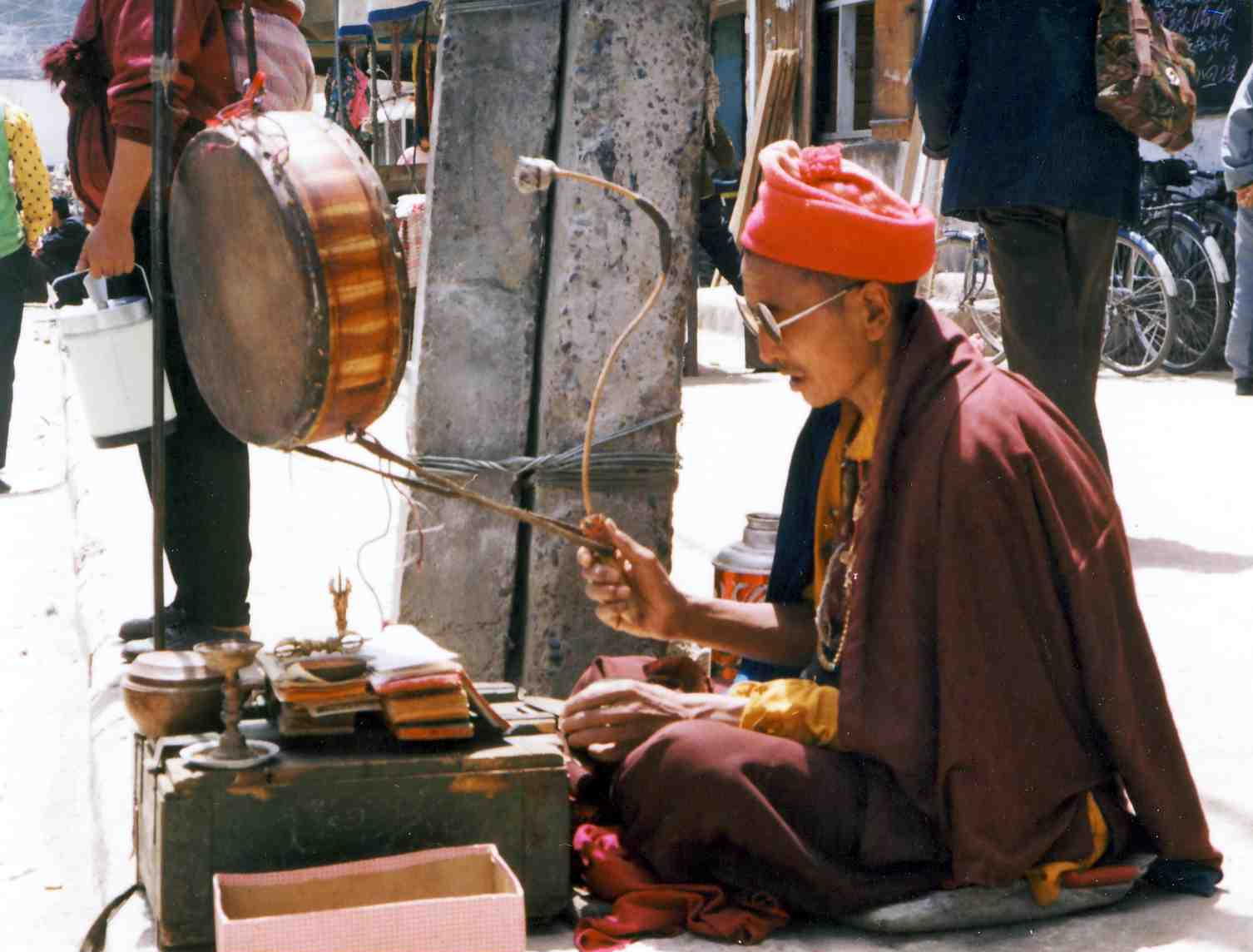 Mendicant monk in Lhasa